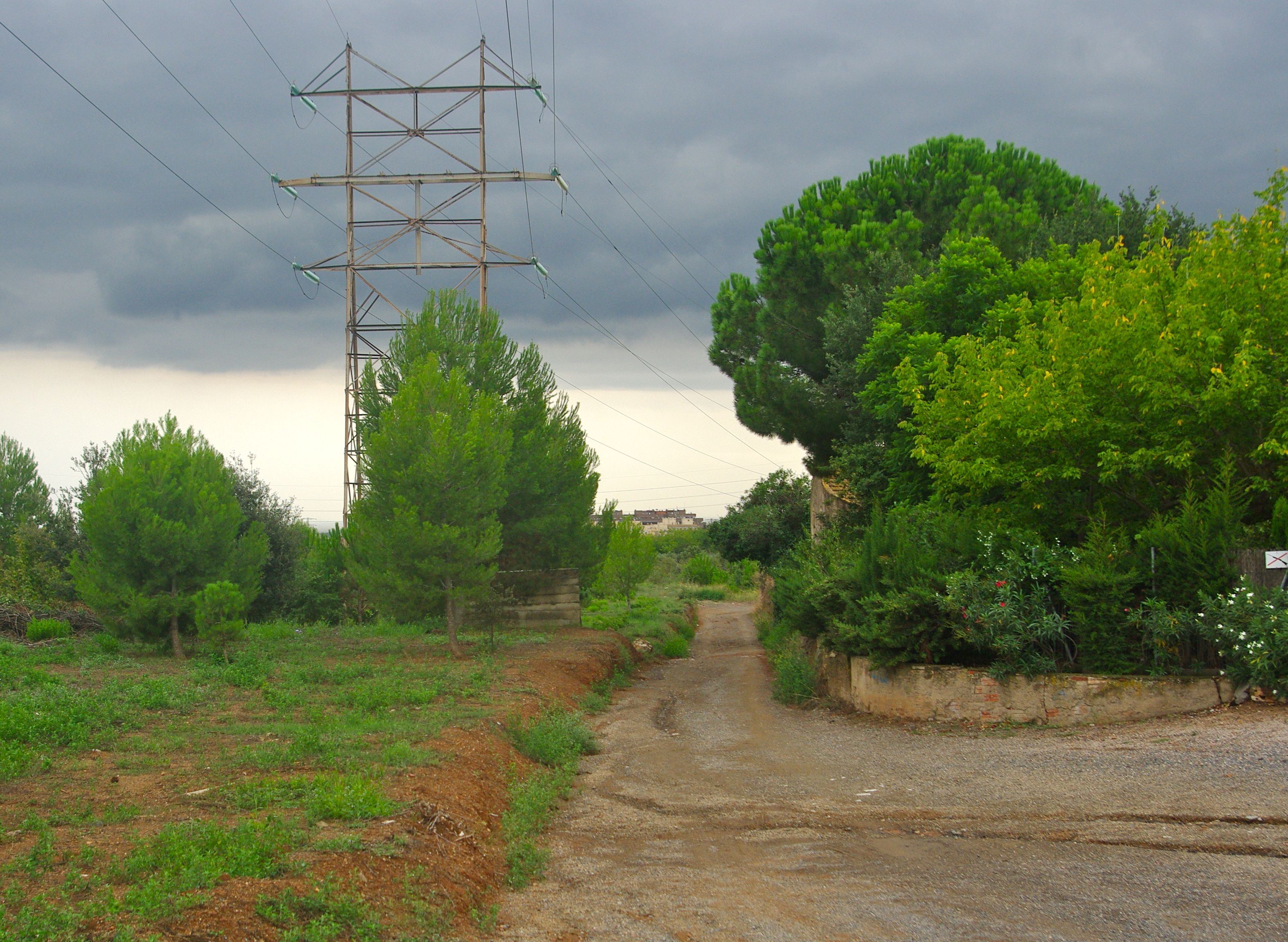 El camí Vell de Castellvell a l'arribar al Pinar, al terme de Reus